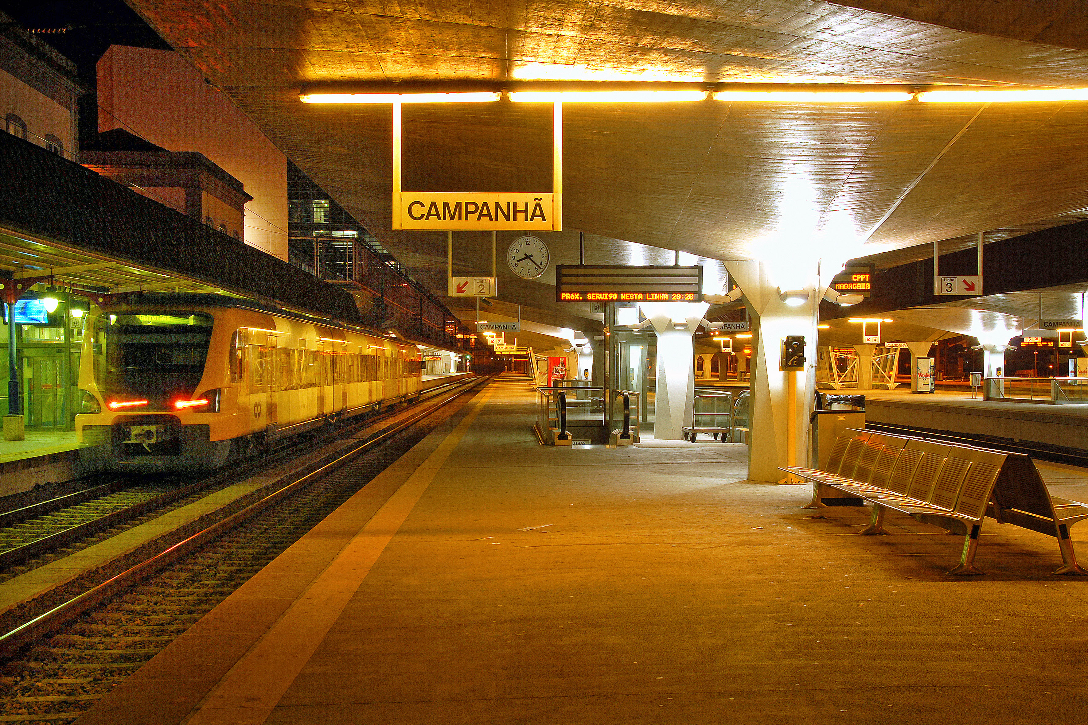 Campanhã-Estação Ferroviária de Campanhã This file was uploaded for Wiki Loves Monuments in Portugal with the unique identifier 97023030.